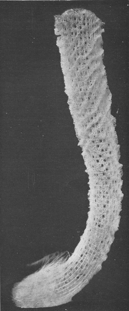 Venusmandje.